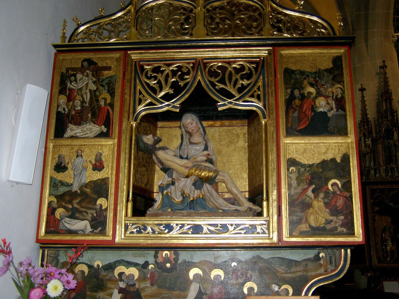 Bazilika sv. Egídia, oltár Bolestnej Panny Márie